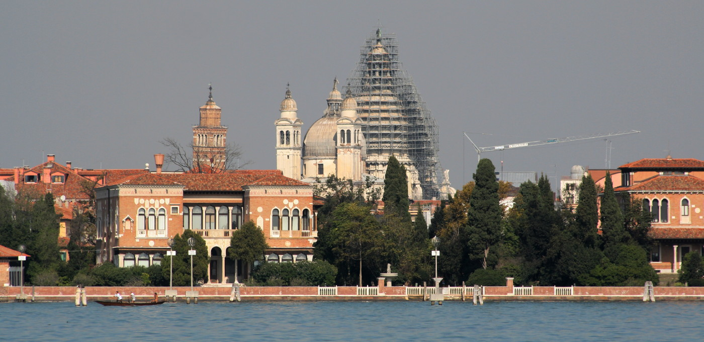 Venice IMG_2065